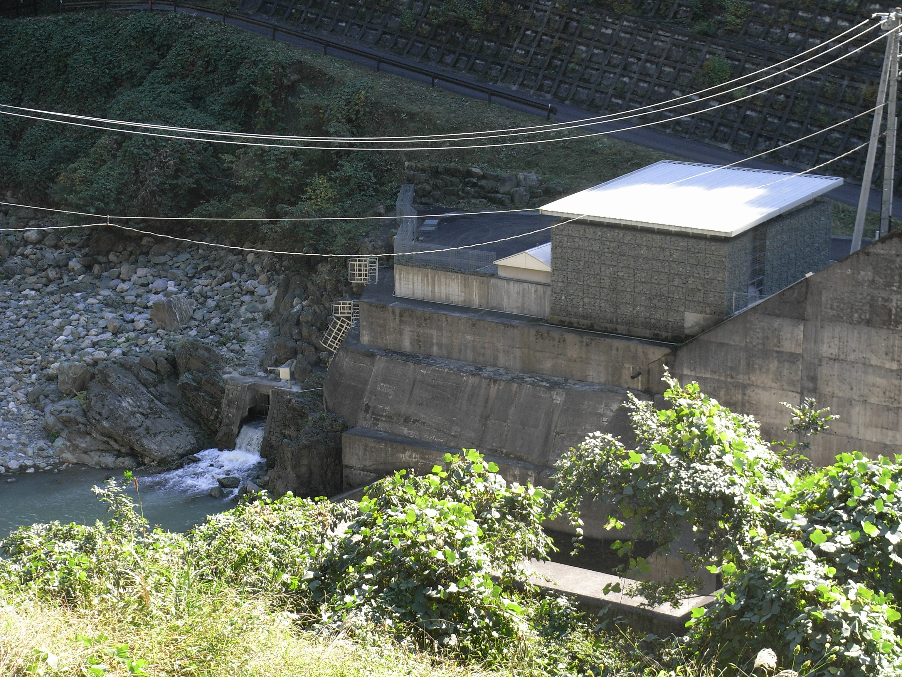 Dam